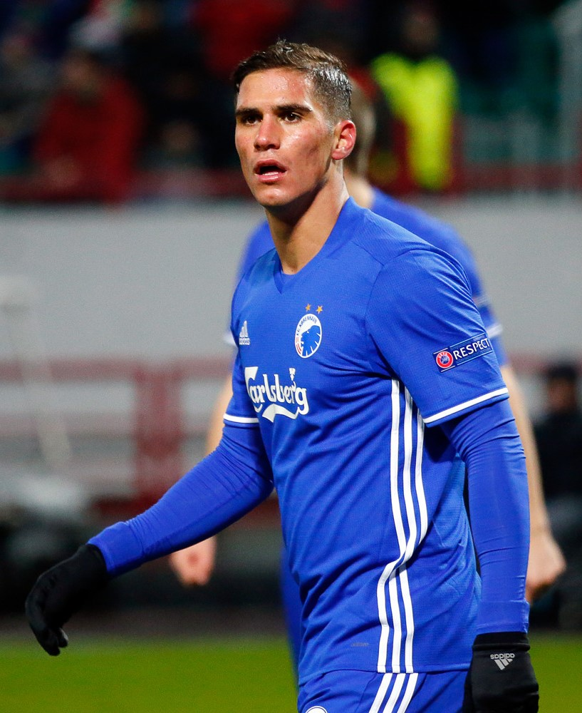 Pieros Sotiriou